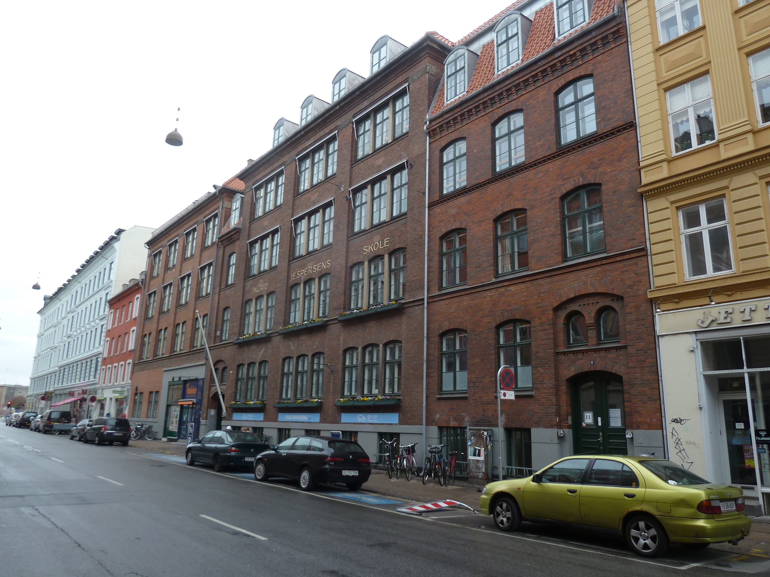 The school Ingrid Jespersens Gymnasieskole in Østerbro in Copenhagen.